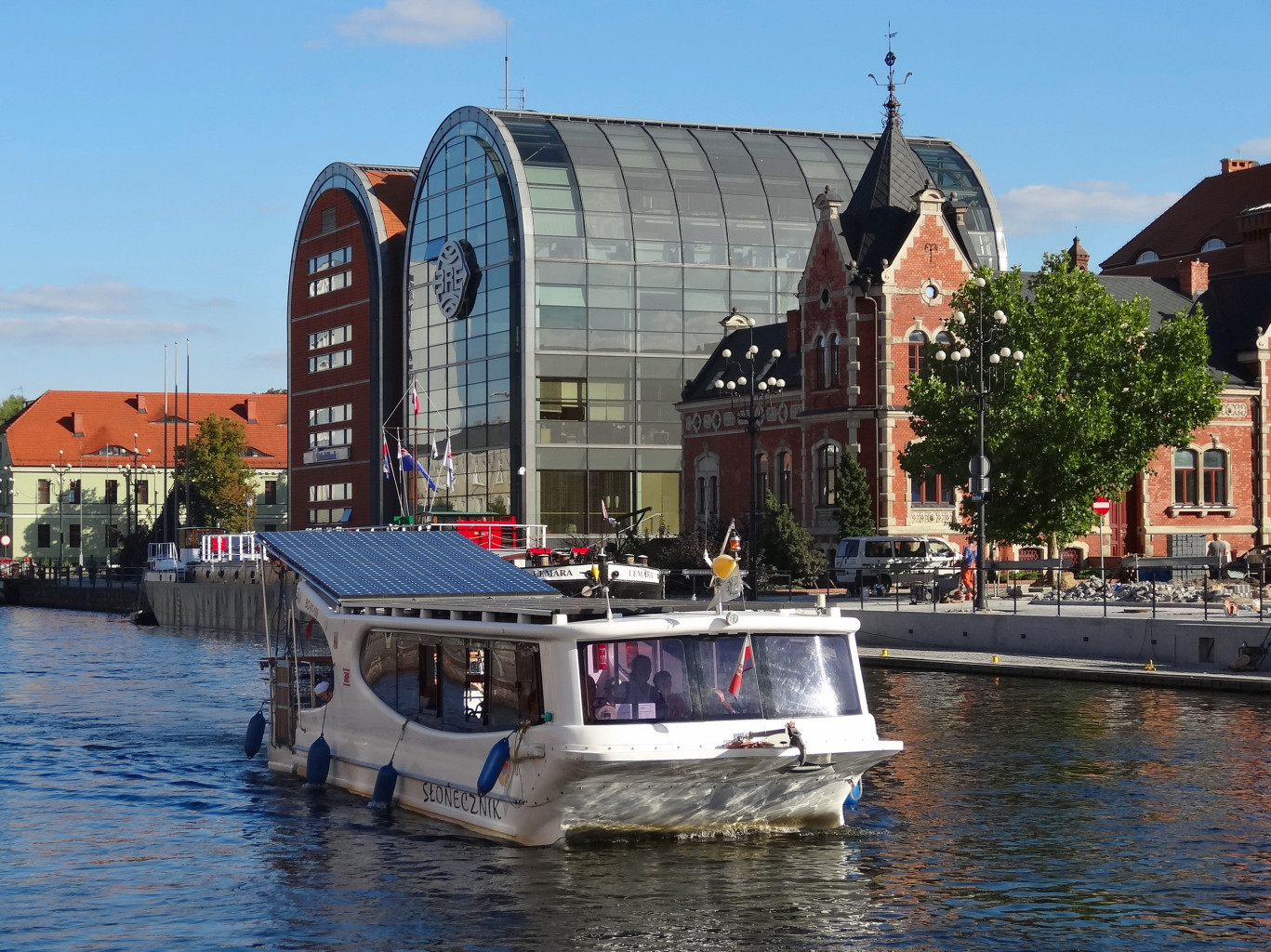 Południowe nabrzeże Brdy w centrum Bydgoszczy